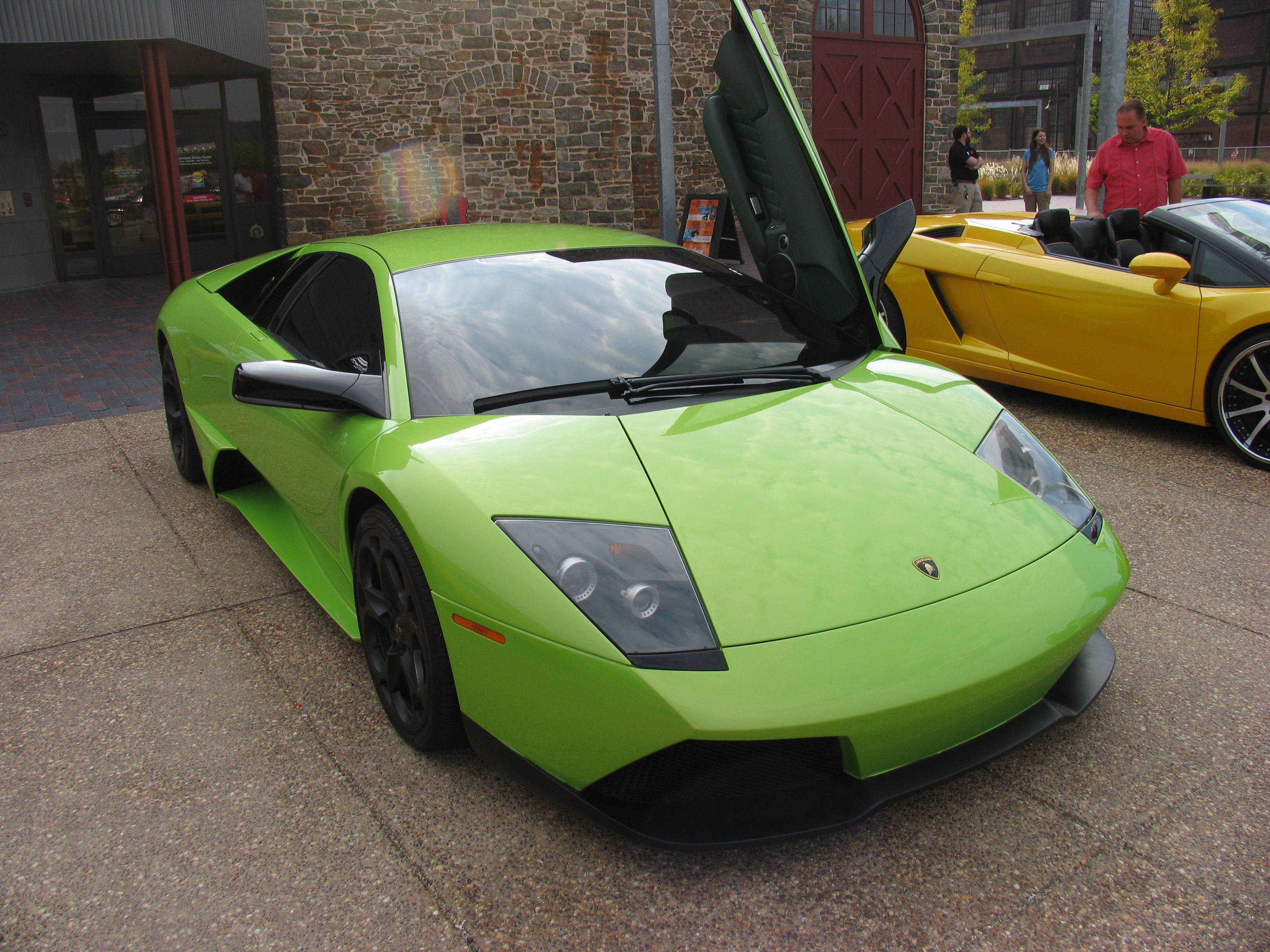 Lamborghini Murcielago LP640-4